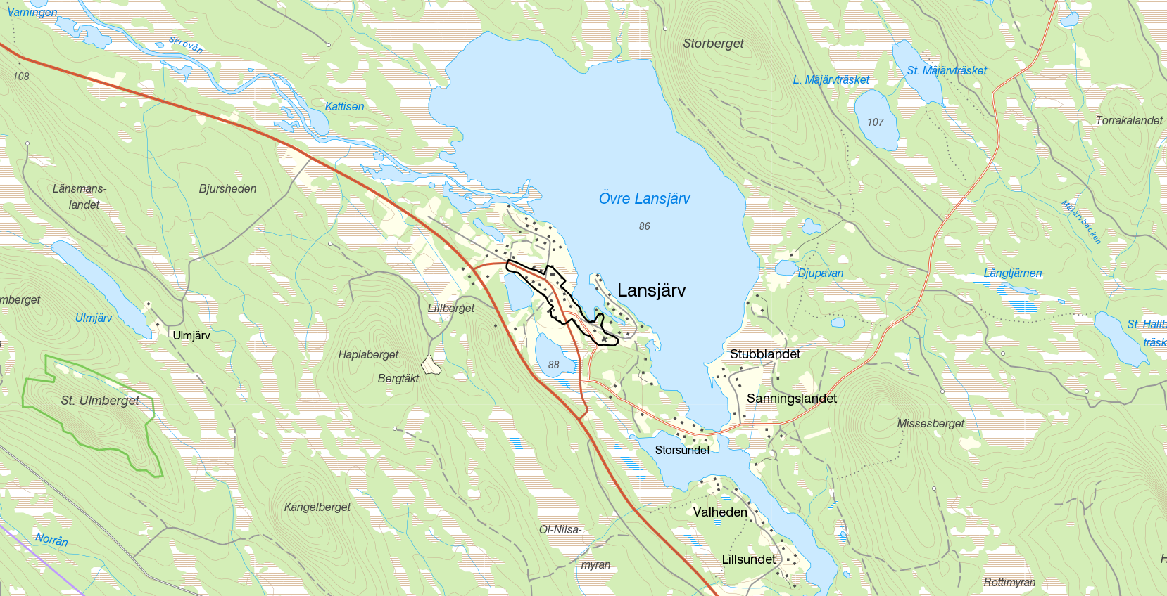 Småorten Lansjärv med gränserna från Statistiska centralbyråns småortsavgränsning 2010. Bakgrundskarta från Lantmäteriet, skala 1:30 236.